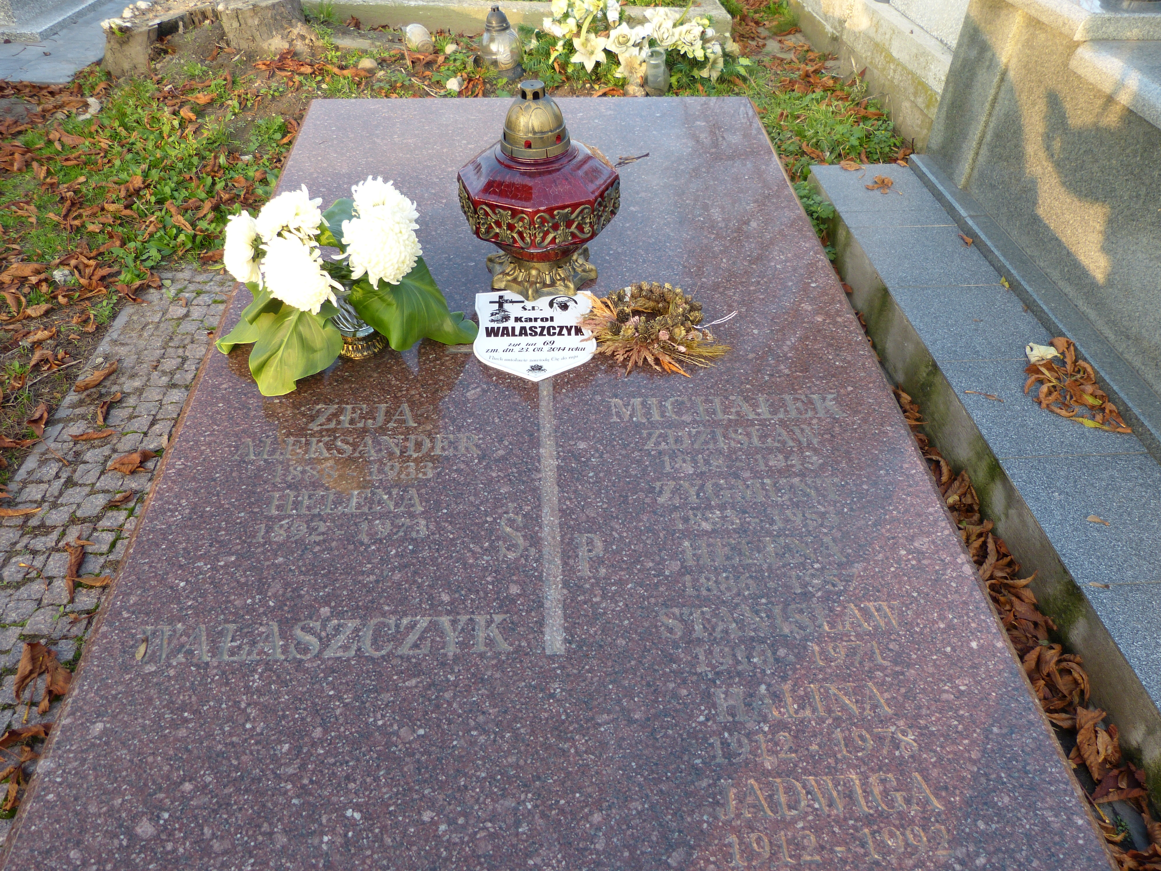 Karol Walaszczyk (1945 - 2014) – z zawodu inżynier, z pasji i talentu wybitny fotografik, autor wielu wystaw i wydawnictw fotograficznych, członek rzeczywisty Fotoklubu Rzeczypospolitej Polskiej Stowarzyszenia Twórców oraz Związku Polskich Artystów Fotografików. Działacz kulturalny i społeczny. Zasłużony Działacz Kultury. Opiekun Miejsc Pamięci Narodowej. Wybitna postać Radomszczańskiej Ziemi. Zmarł 23 sierpnia 2014 roku i został pochowany na Cmentarzu Starym w Radomsku – kwatera C0/0040.